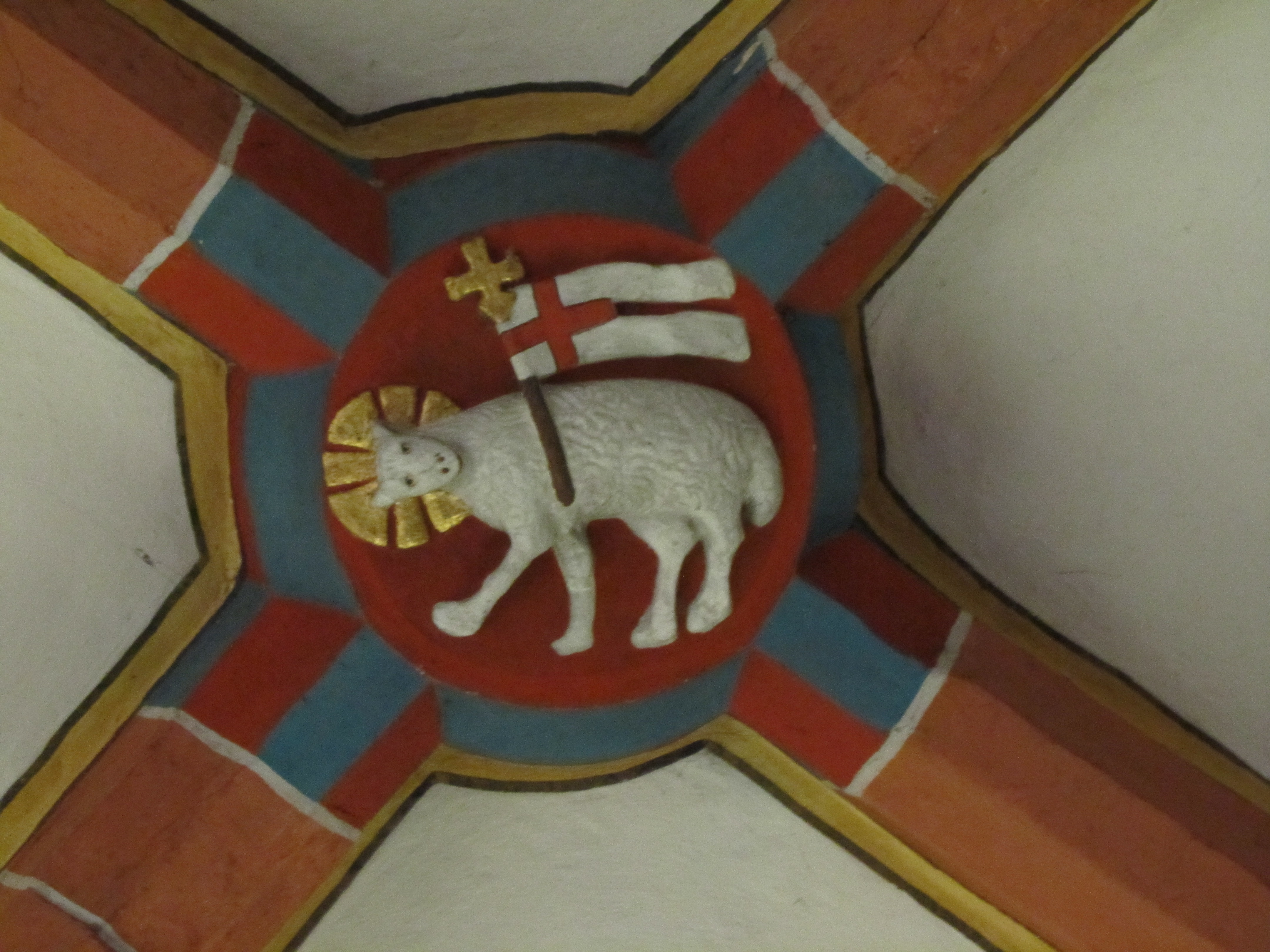 Schlussstein im Kreuzgewölbe des Turmes, Unionskirche in Mannheim-Käfertal